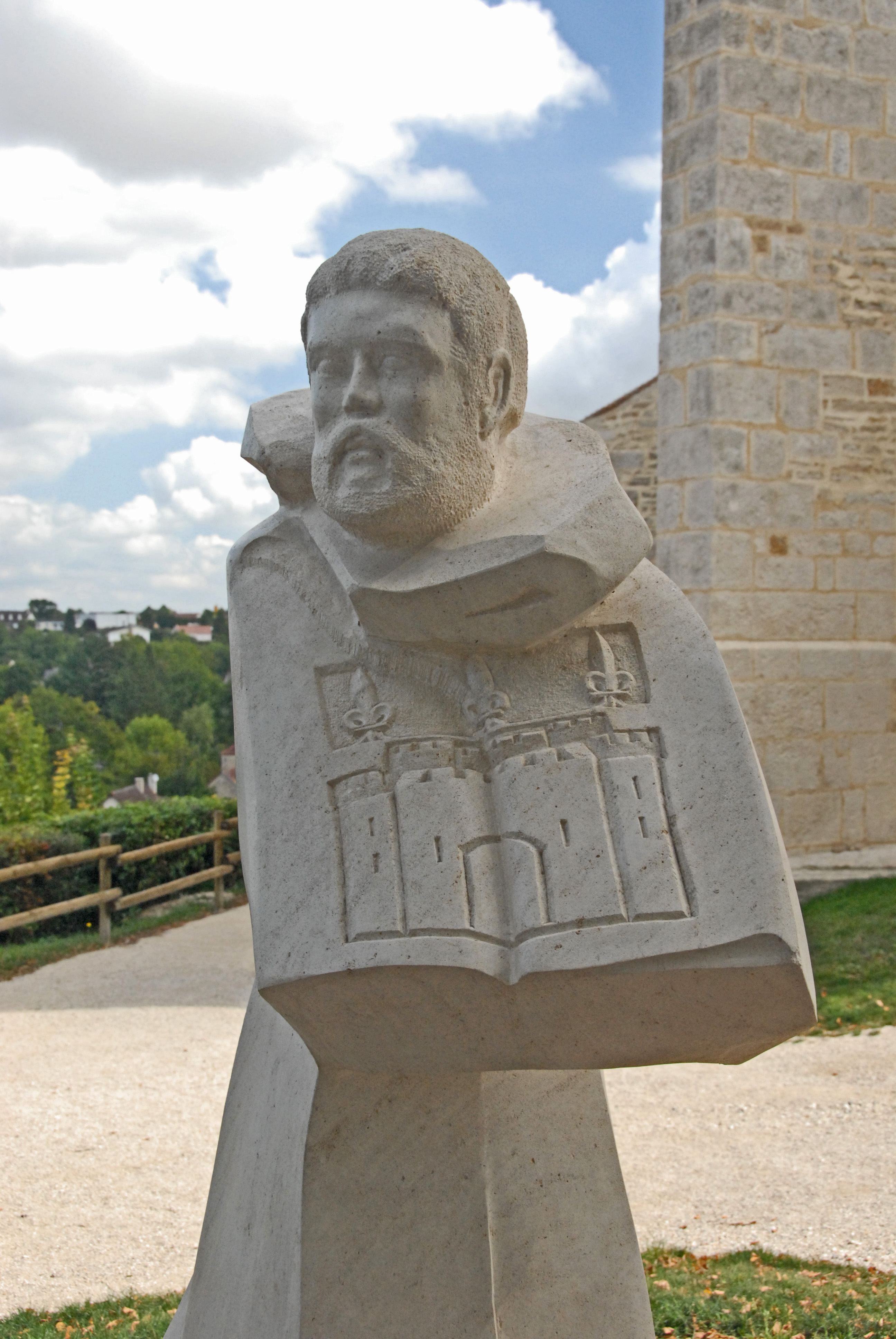 St-Vorles de Châtillon-sur-Seine, Statue des Heiligen